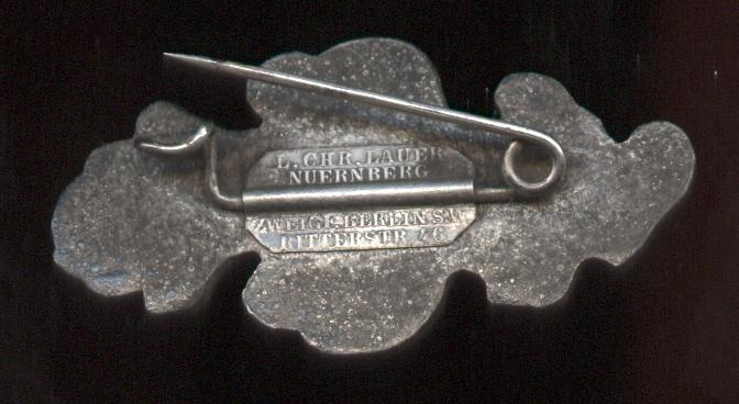 Souville Abzeichen (Eichenblatt) RIR 81, 1916, Rückseite mit Hersteller